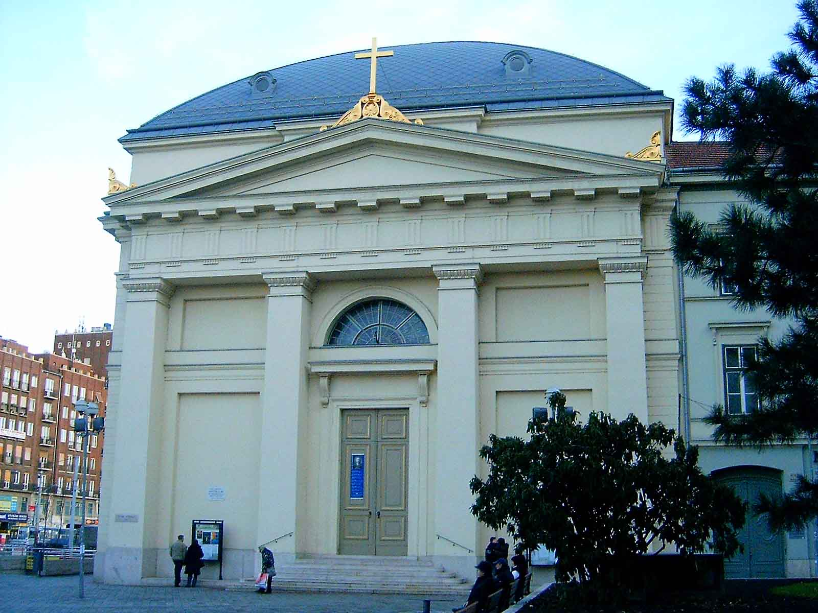 Deák téri evangélikus templom (Budapest, V. kerület)